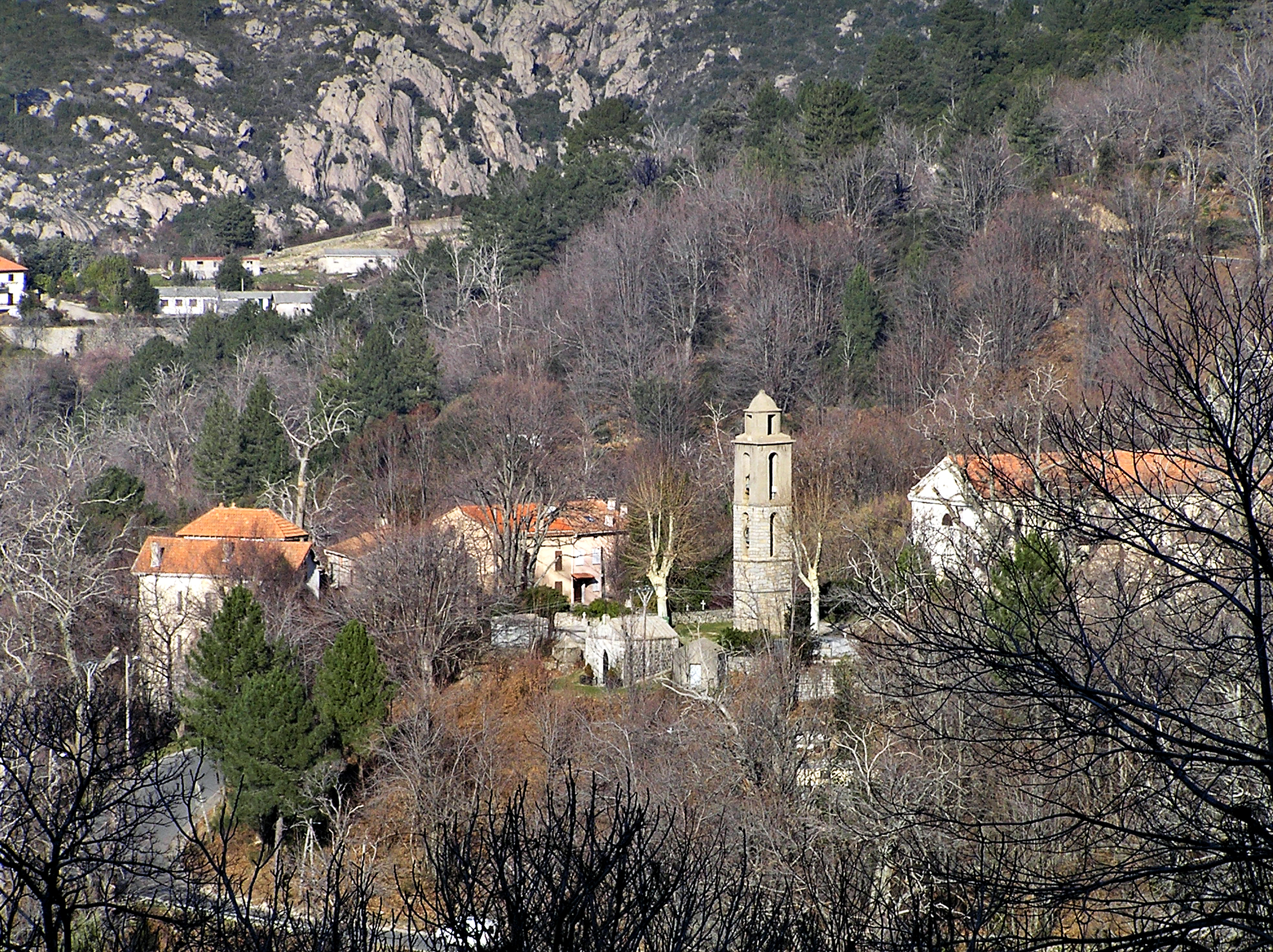 Bocognano (Corse) - Église Sainte-Lucie